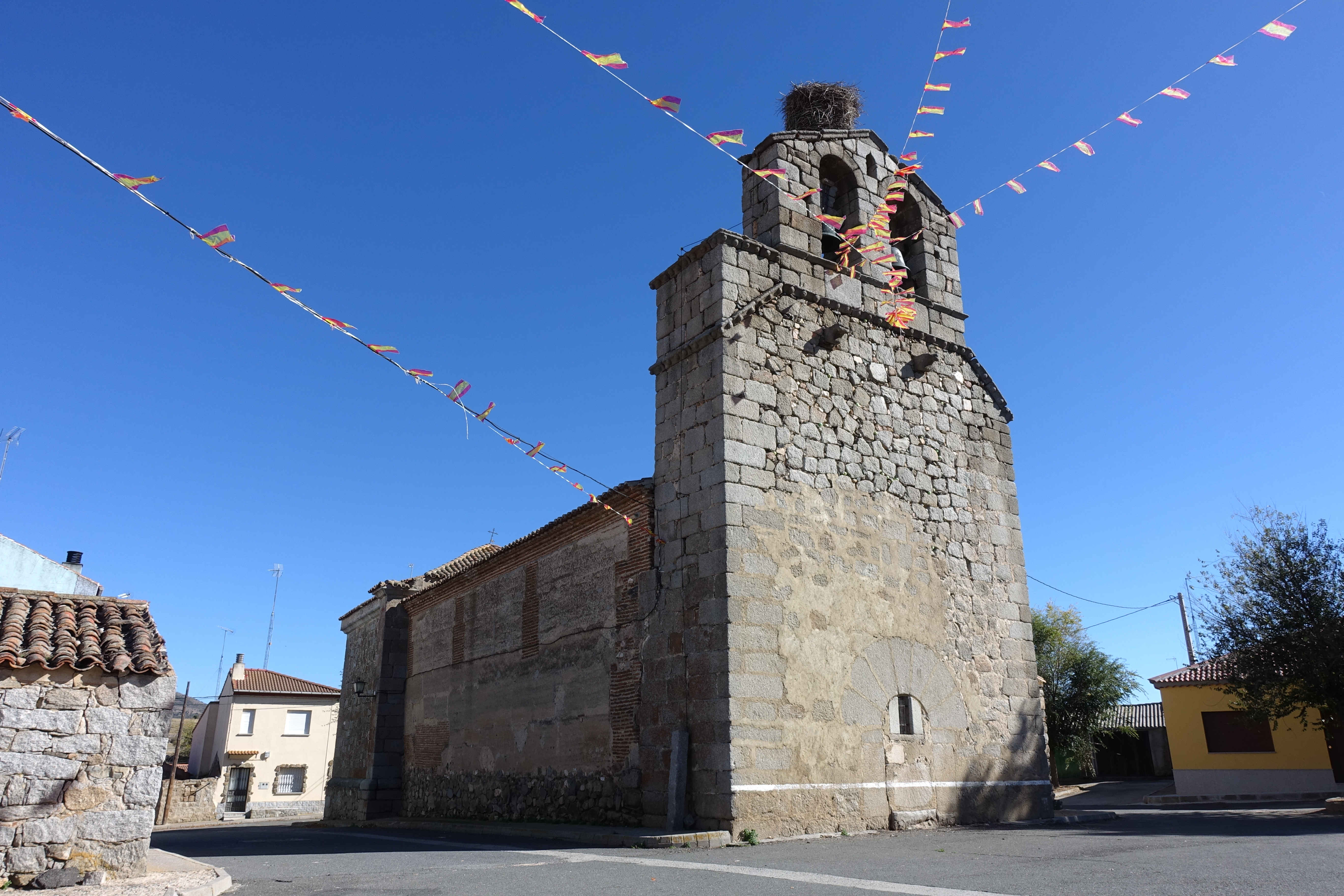 Iglesia de Santo Tomás Apóstol, en Mediana de Voltoya (Ávila, España).